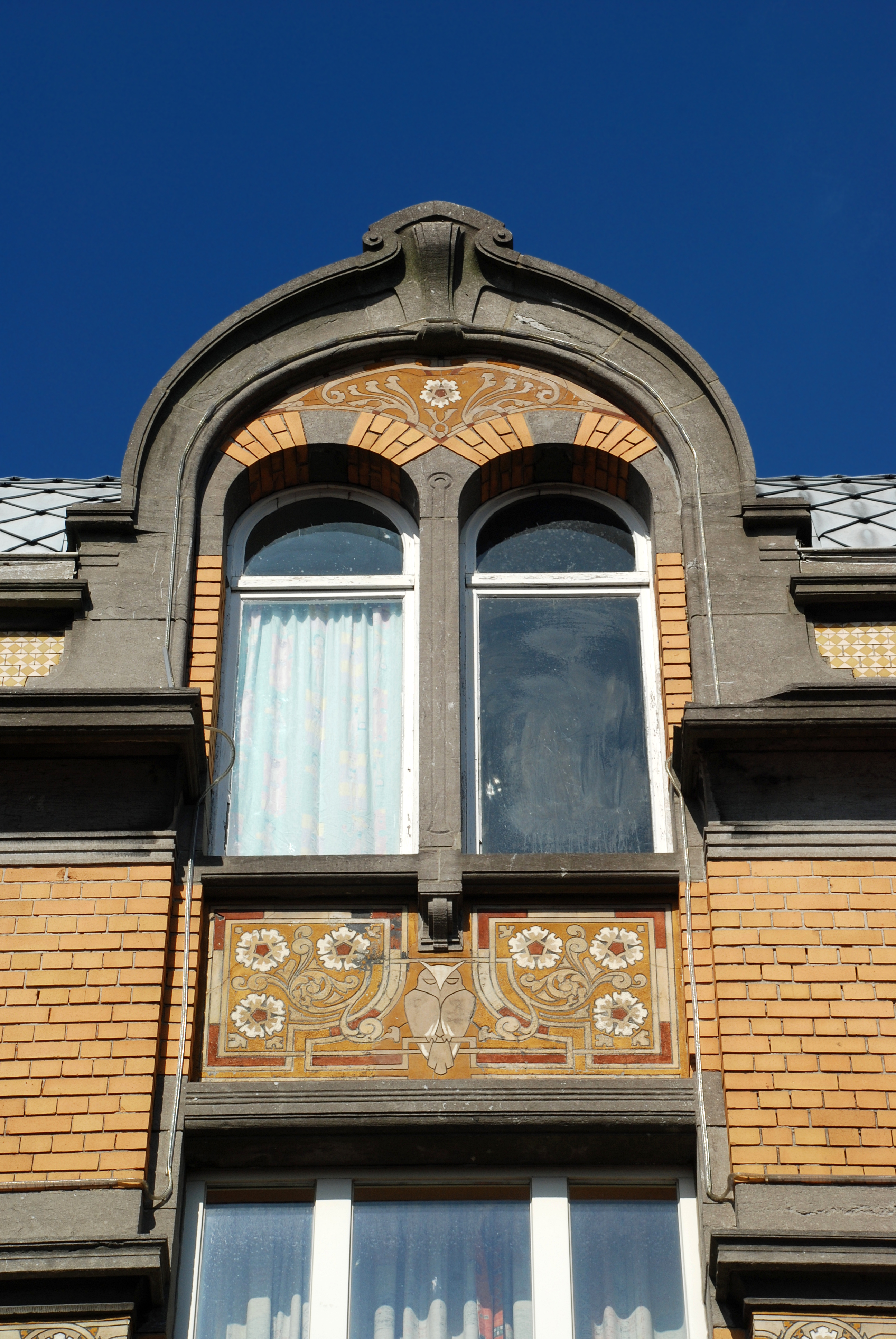 Belgique - Bruxelles - Ancienne école communale des filles de Koekelberg (Art nouveau - architecte Henri Jacobs)